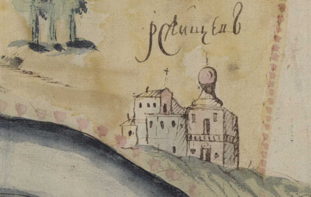 Фрагмент карти Київської губернії. XVIII століття. РГАДА, ф. 192, оп. 1, Киевская губ., № 5.